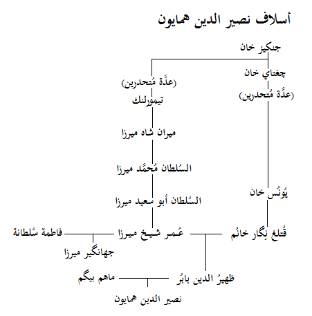 شجرة نسب نصير الدين همايون ثاني سلاطين الهند المغول